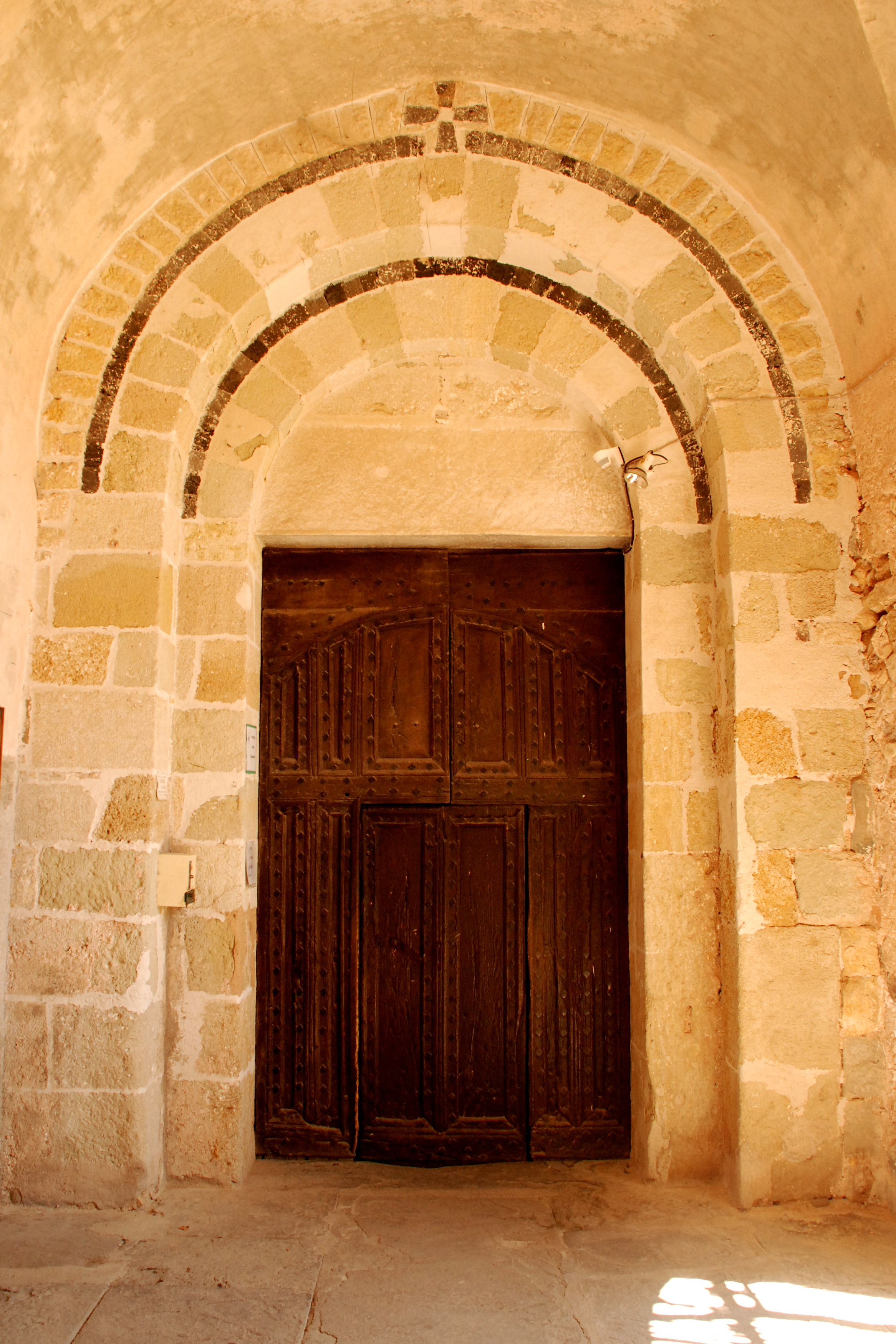 France - Languedoc - Hérault - Église Sainte-Marie de Quarante - porte romane .